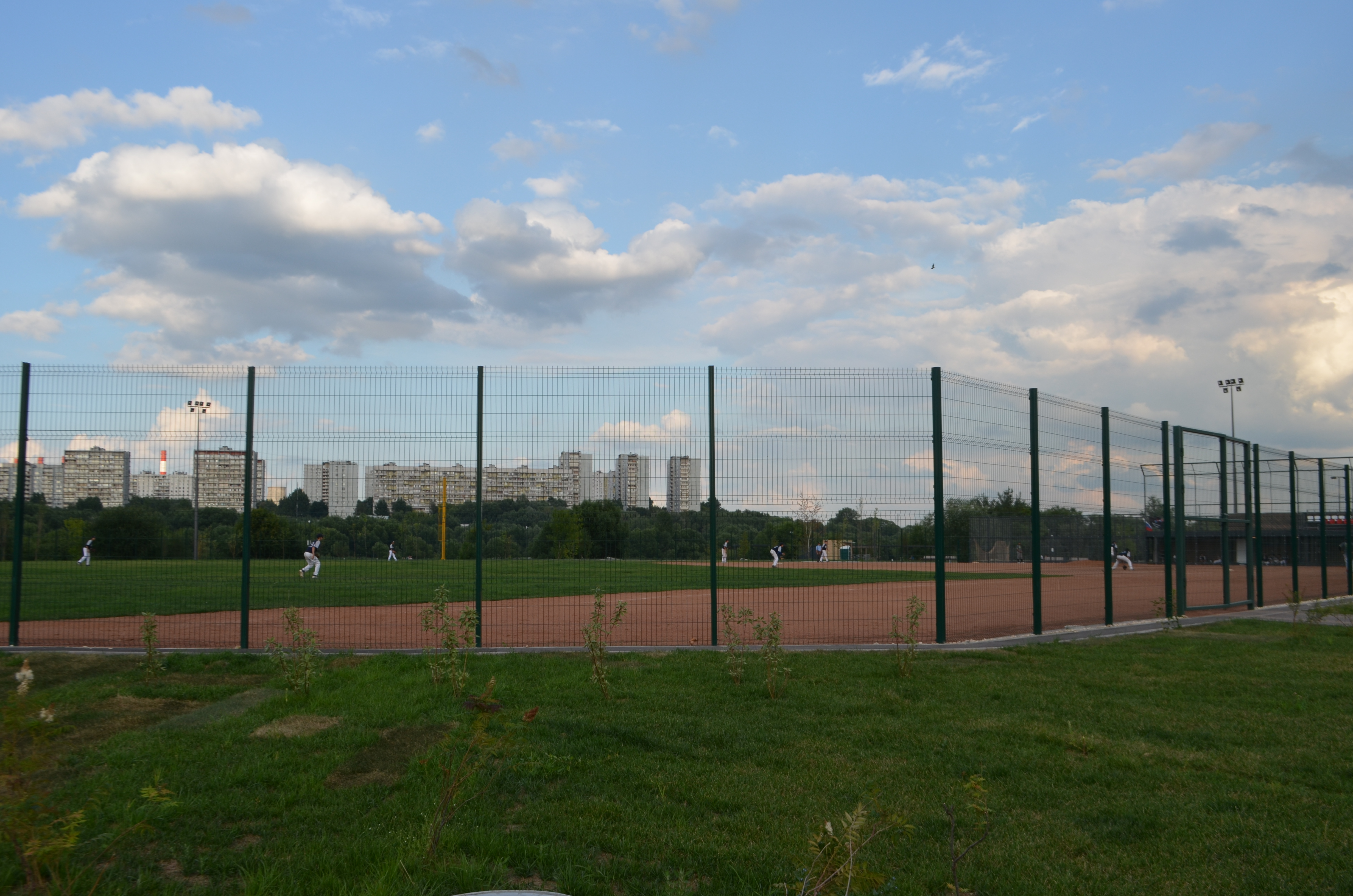 Бейсбольное поле в парке «Братеевская пойма»